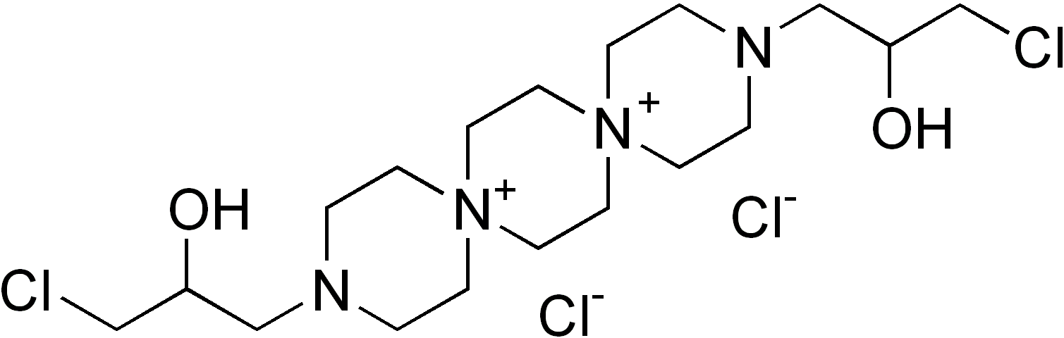 chemical structure of prospidium chloride(prospidine)